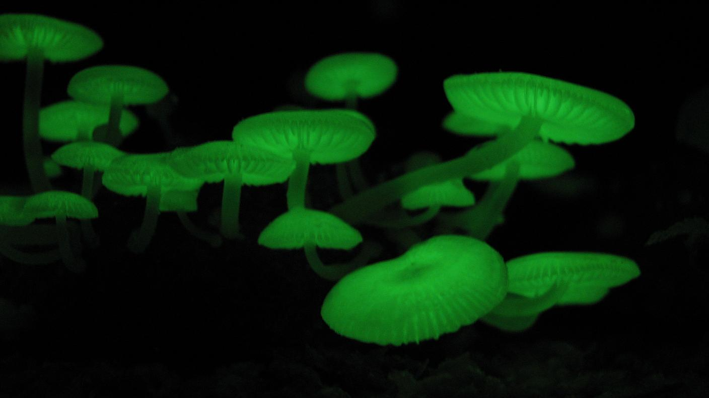 Mycena chlorophos at Hachijojima botanical park(ヤコウタケ・八丈島植物公園)